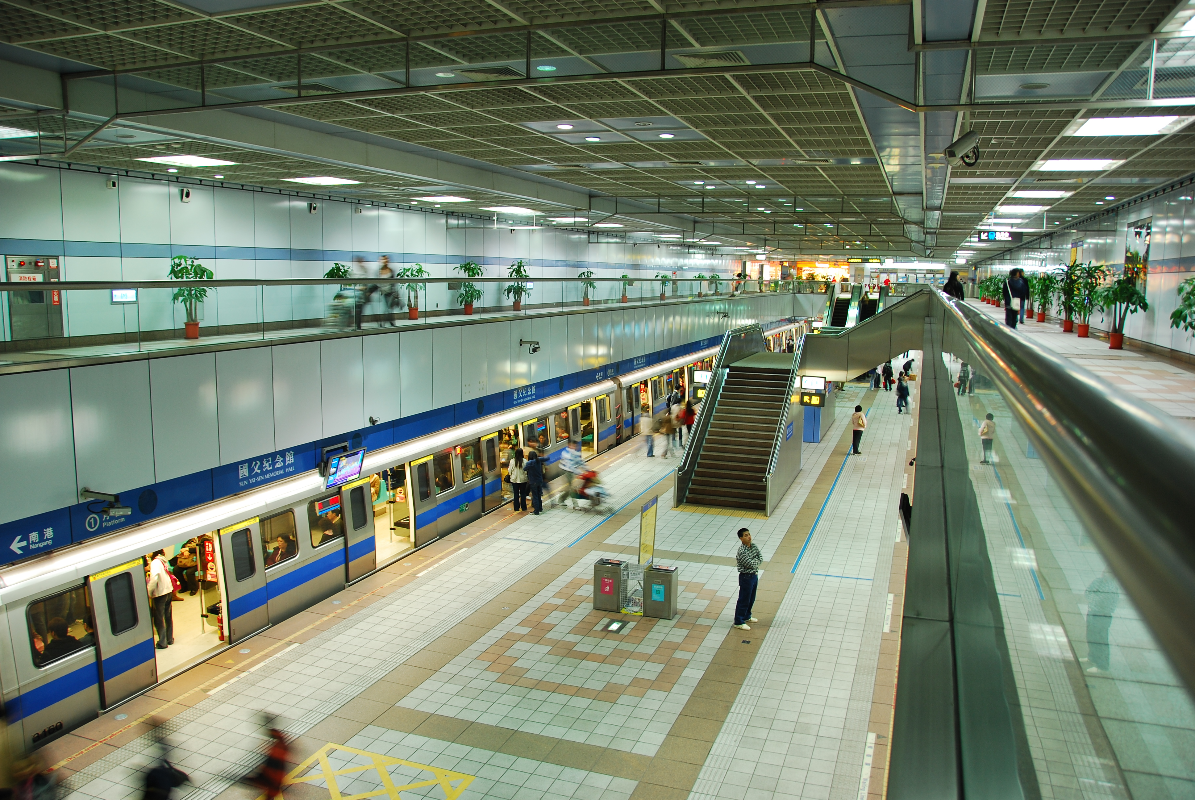 中文（台灣）: 台北捷運國父紀念館站藍線月台層